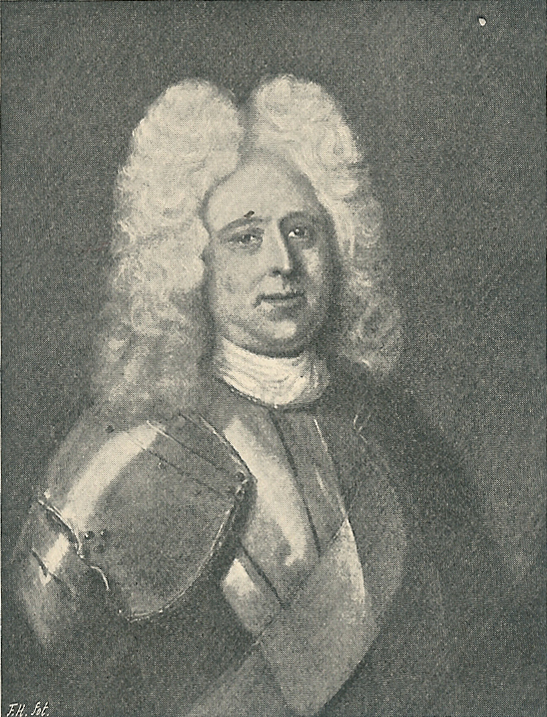 Christian Ditlev Reventlow. 1671-1738. Officer. Ledte landgangstropperne i Skåne under den Store Nordiske Krig. Blev senere overpræsident i Altona.